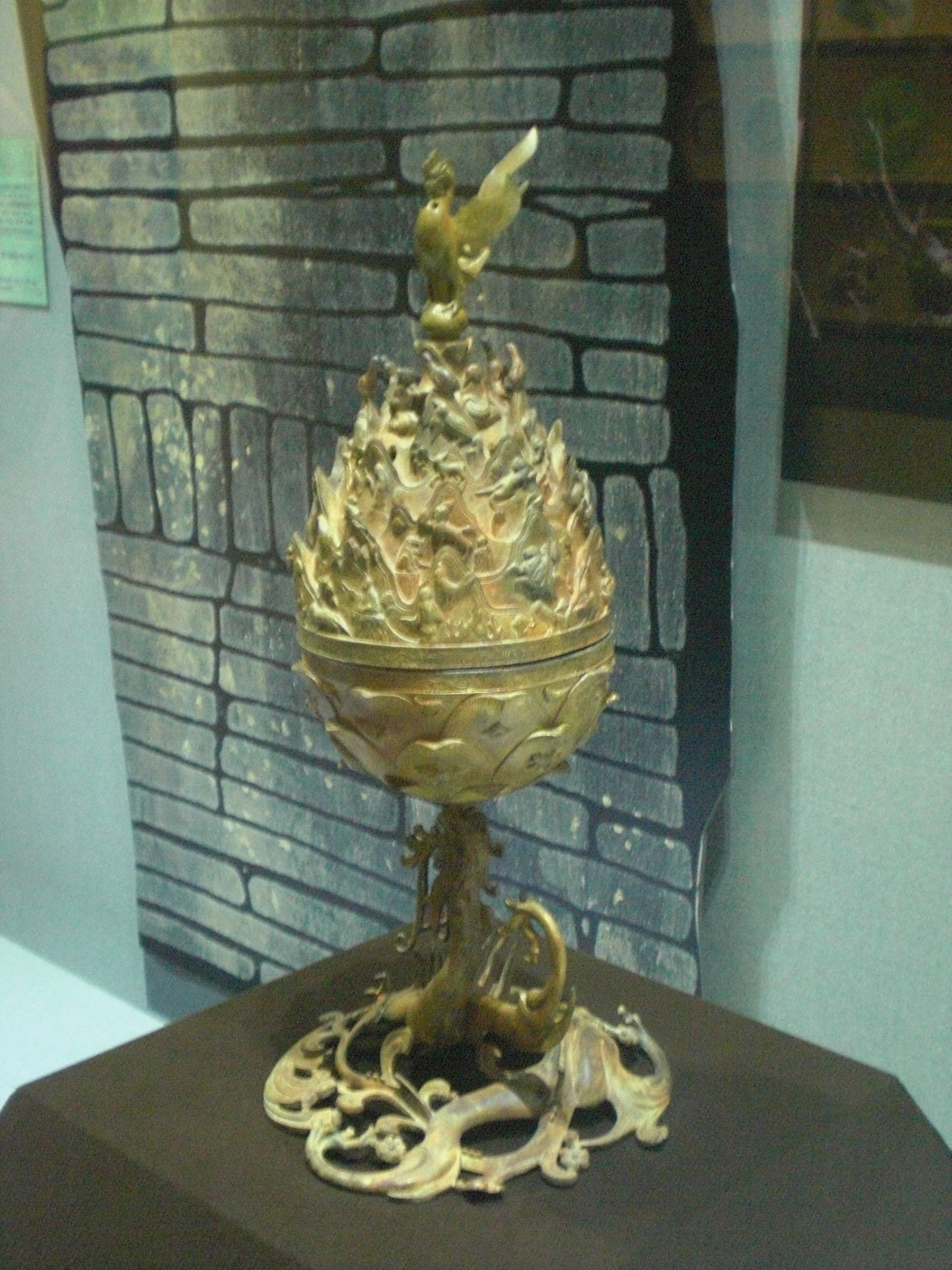 Adorujo